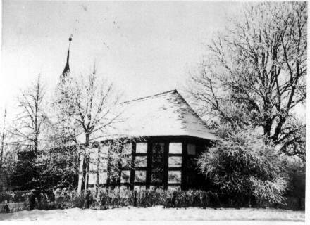 Motarzyn - widok kościoła w 1940r.